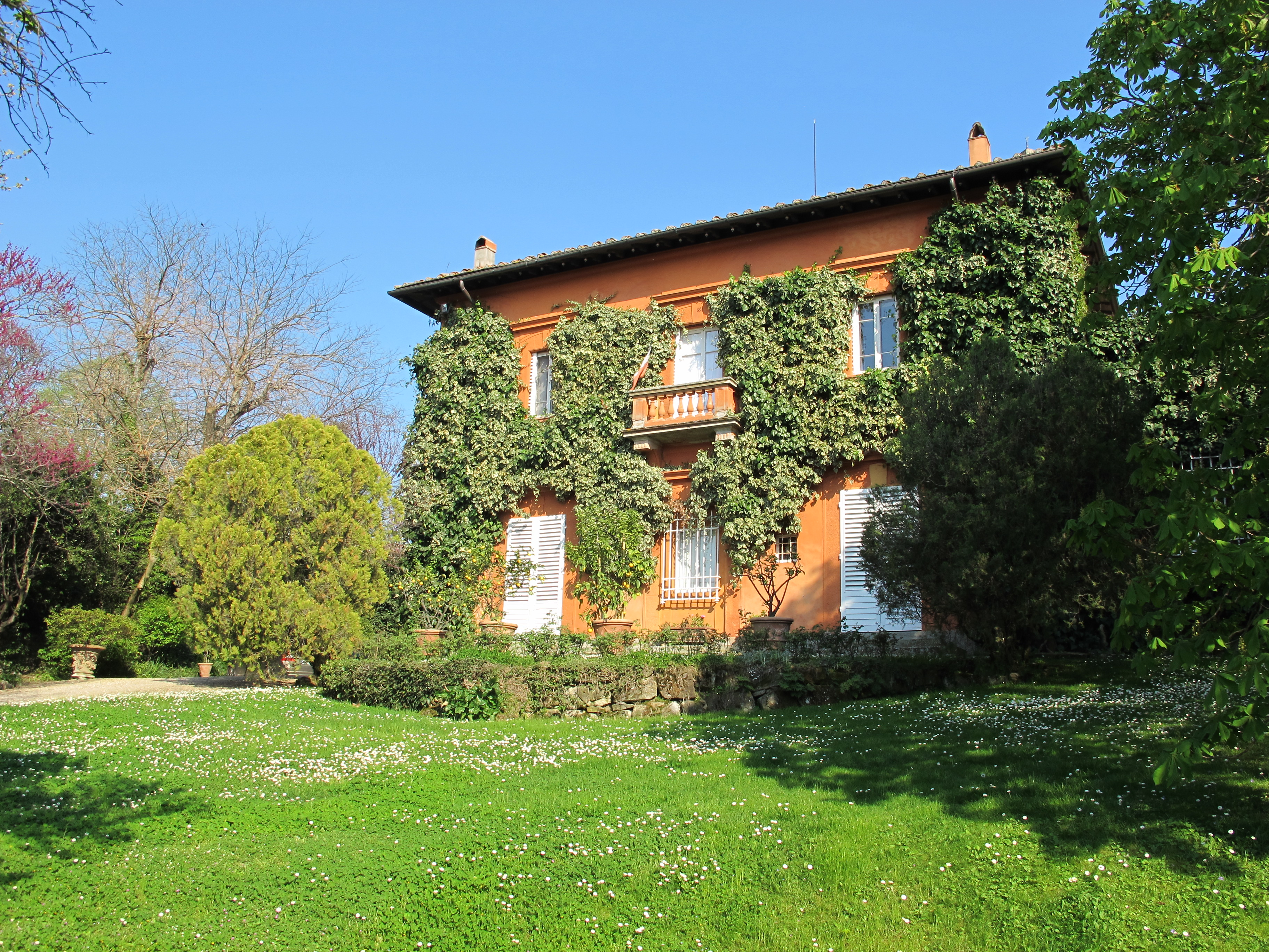 Villa Montececeri, 02.1